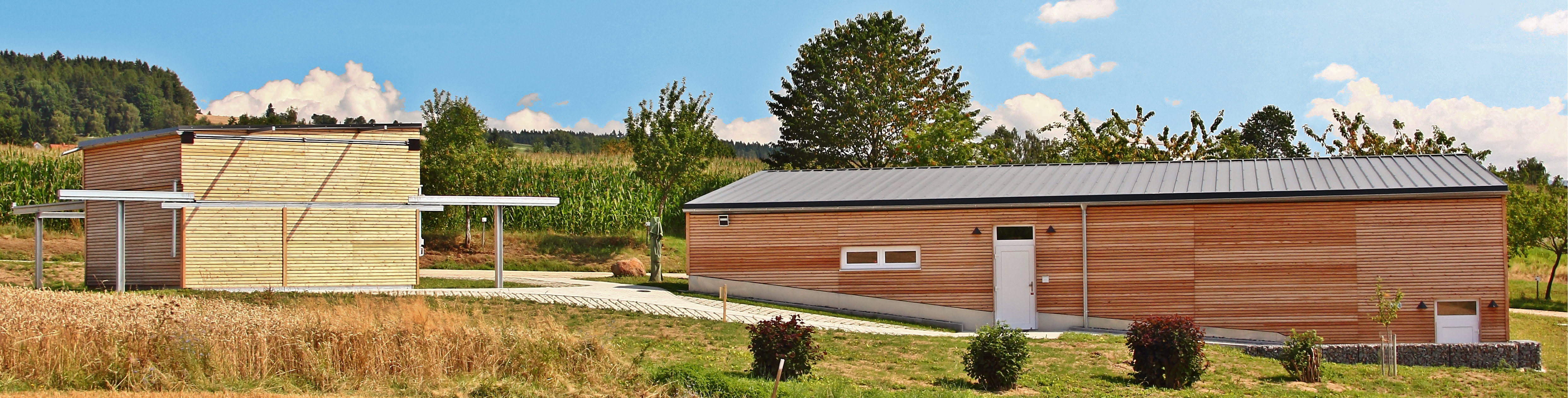 Sternwarte mit Planetarium in Dieterskirchen von außen. Ansicht von Südwesten.